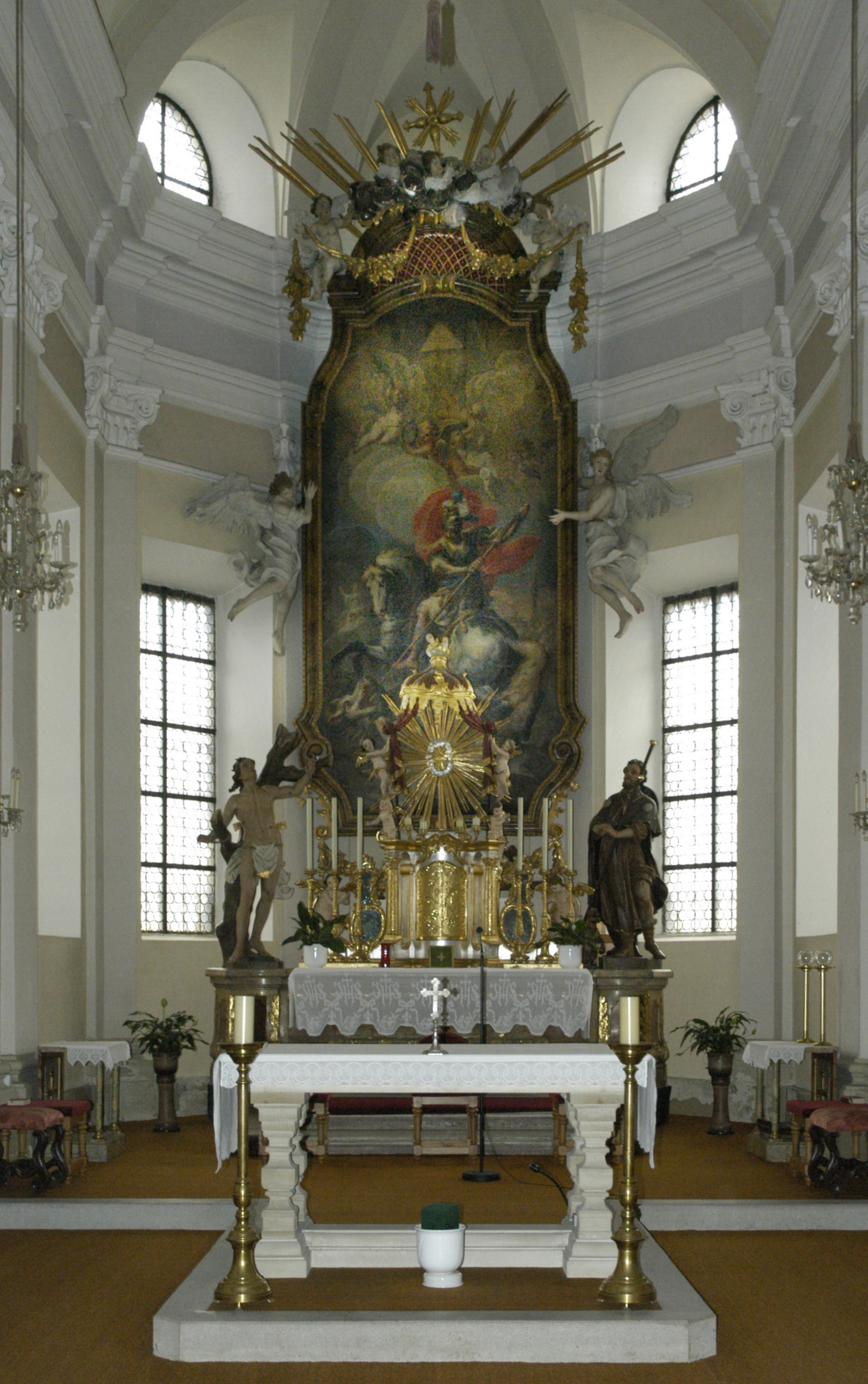 katholische Pfarrkirche heiliger Georg in Aspersdorf, Gemeinde Hollabrunn - Altar